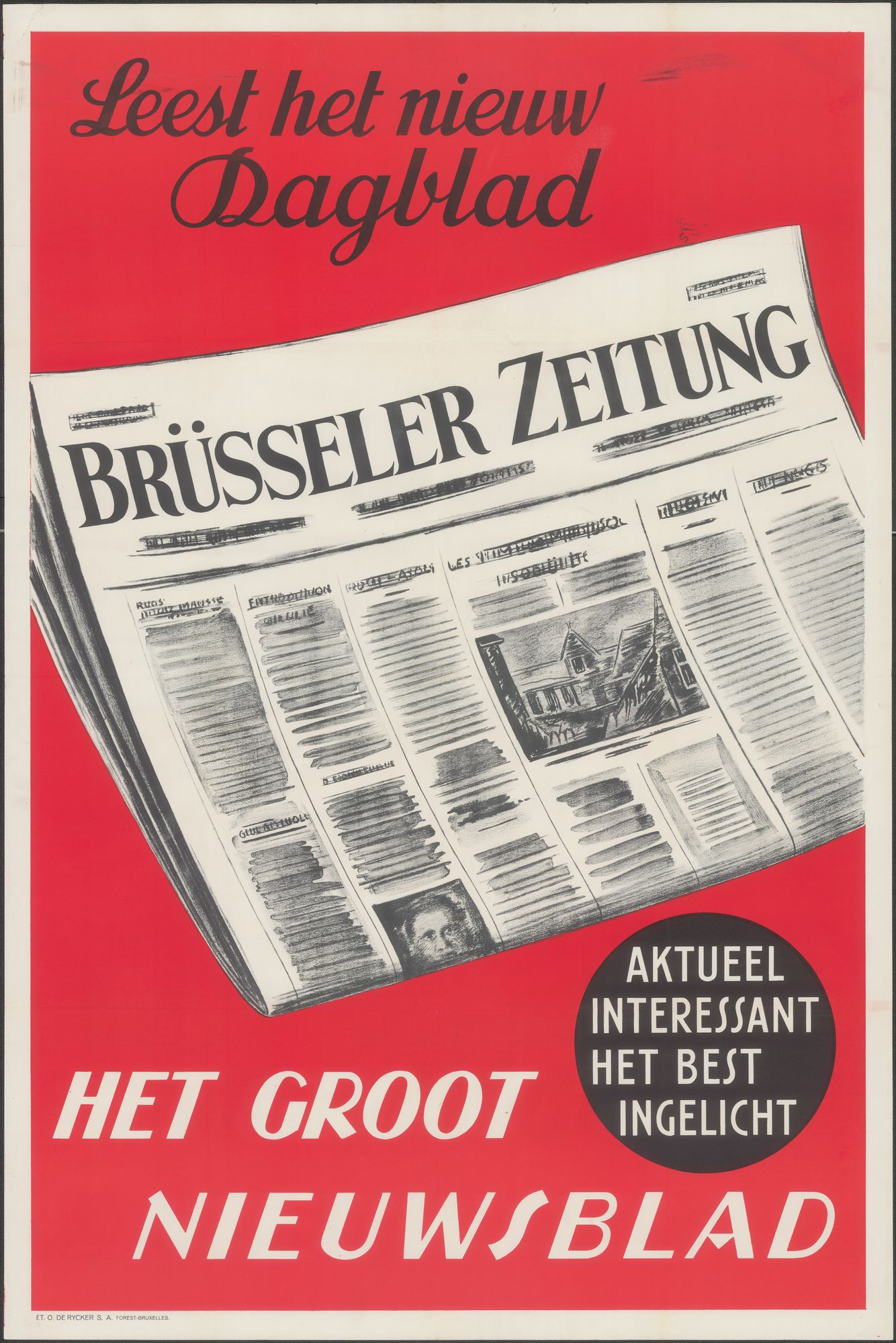 Leest het nieuw dagblad: Brüsseler Zeitung, 1940. Het groot nieuwsblad. Aktueel, interessant, het best ingelicht.